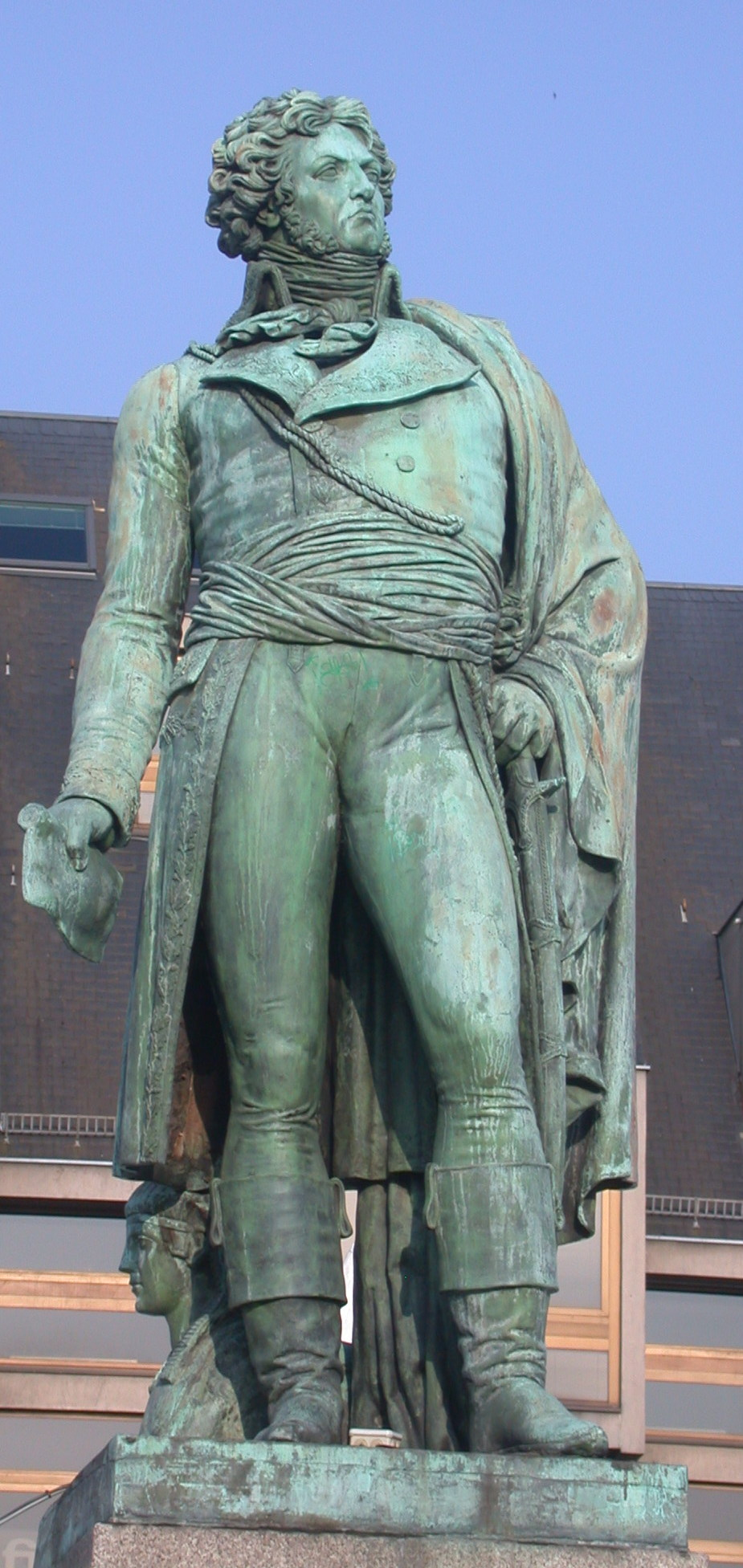 La Statue du General Jean-Baptiste Kléber à Strasbourg